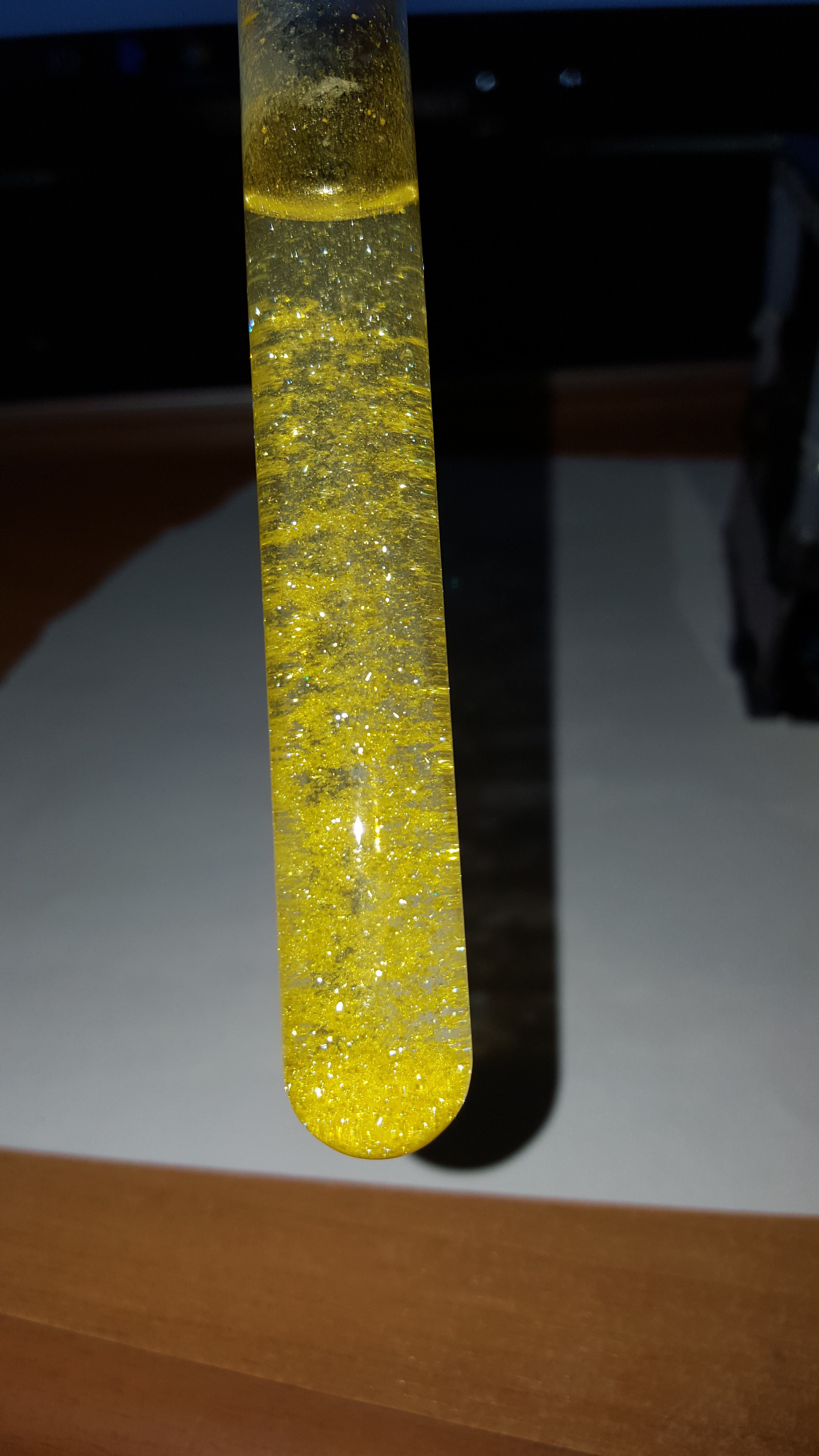 Ricristallizzazione di ioduro di piombo(II) per raffreddamento della soluzione.